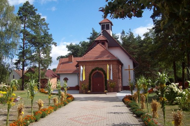 Kaplica św. Jadwigi Śląskiej w Trzebiszynie